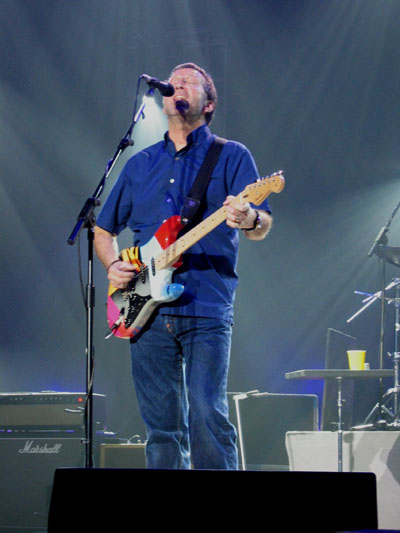 Eric Clapton in Concert am 02.04.2004